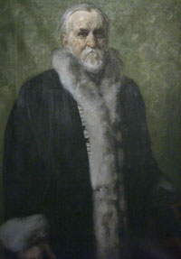 Friedrich Müller der Ältere (1828–1915), Bischof der Evangelischen Kirche A. B. in Siebenbürgen, gemalt von Carl Dörschlag (1832–1917). Original im Festsaal des Hermannstädter Bischofspalais.